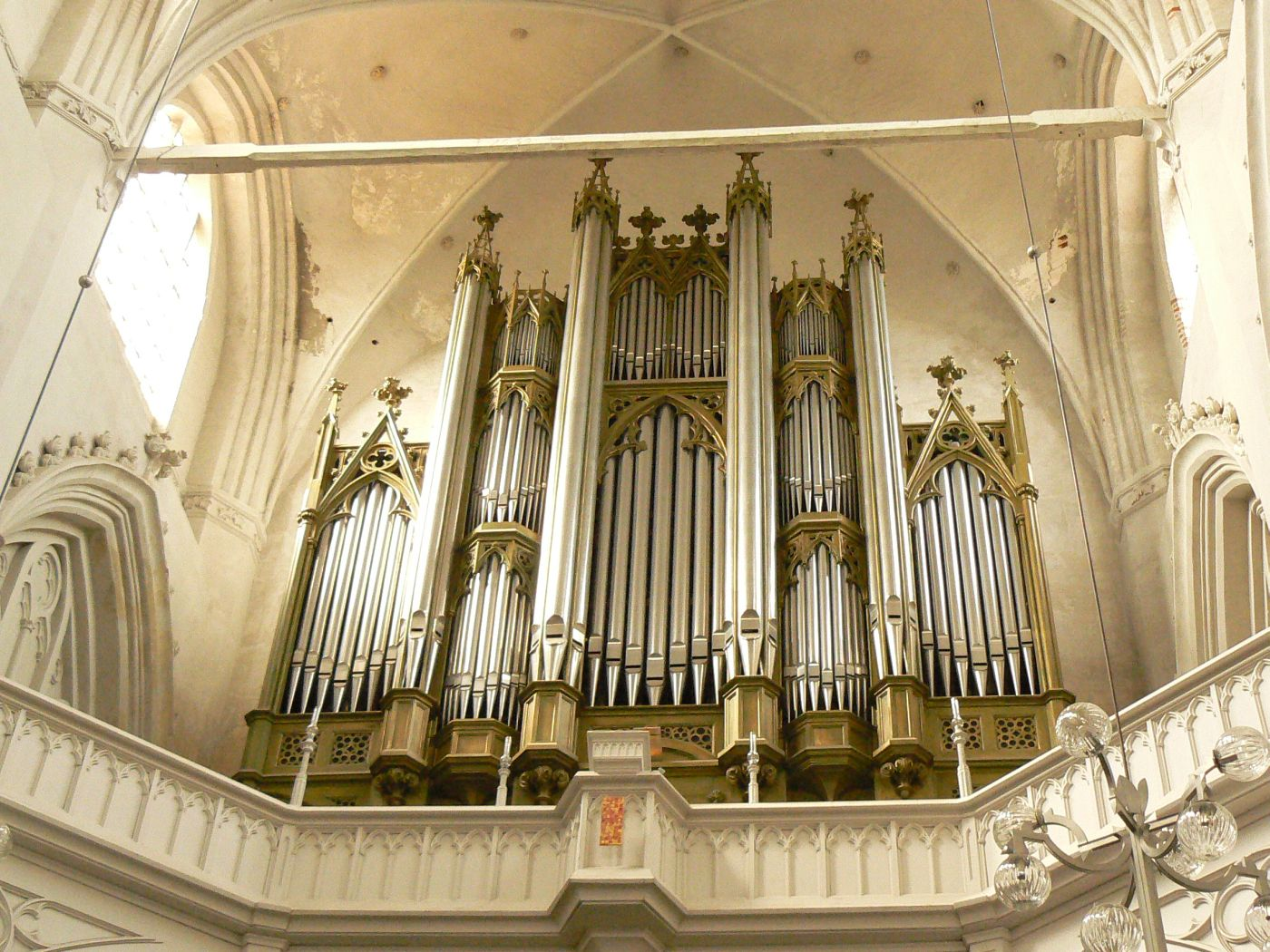 Greifswald, Dom, Prospekt der Buchholz-Orgel (1832)